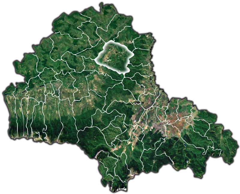 Hoghiz jud Brasov